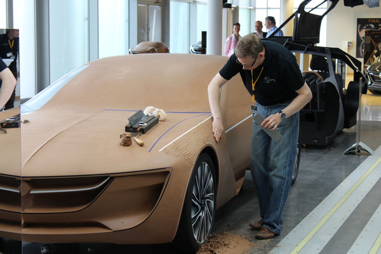 zu Besuch um Opel Designzentrum, Rüsselsheim